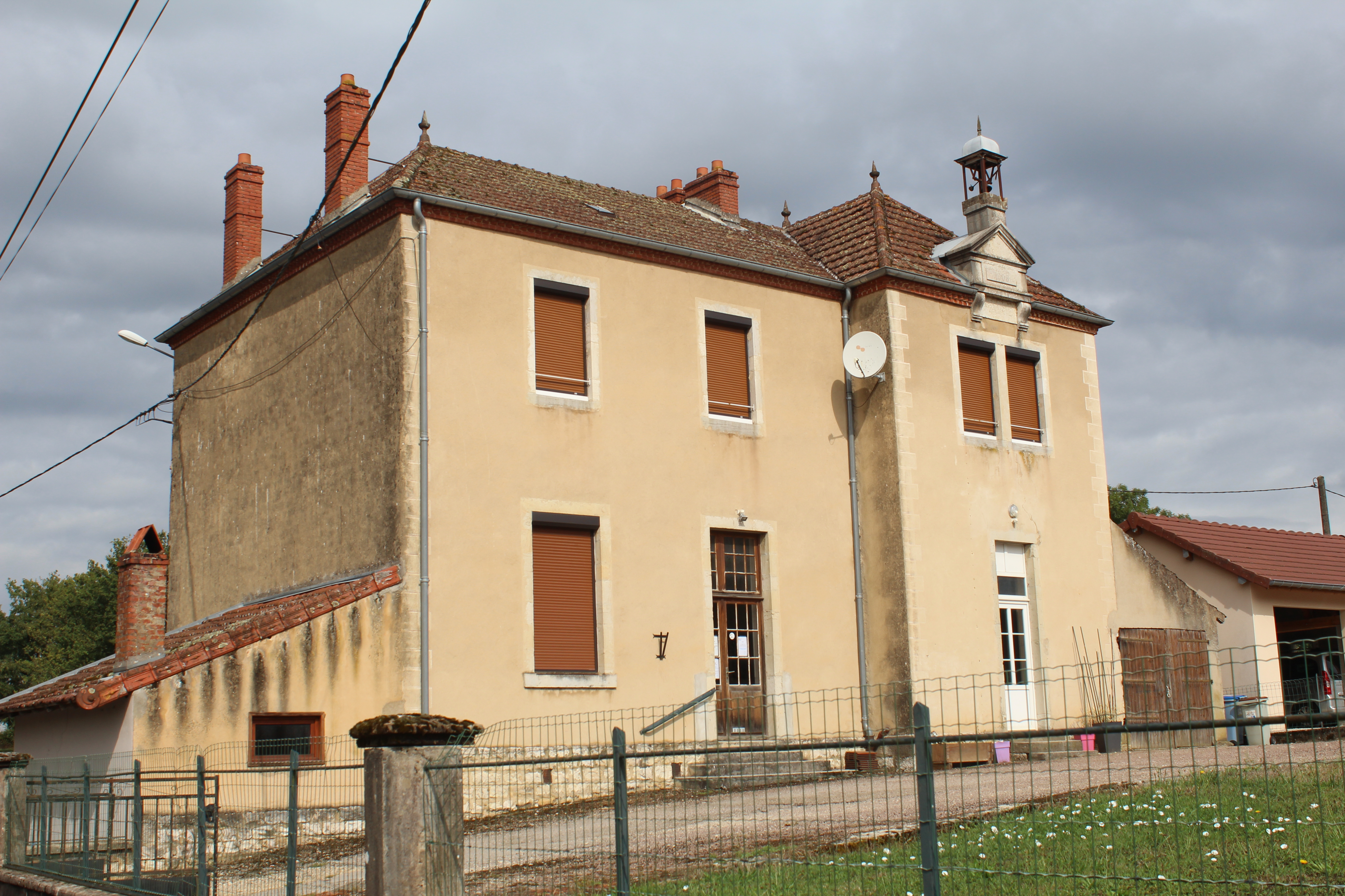 Mairie du Villey.